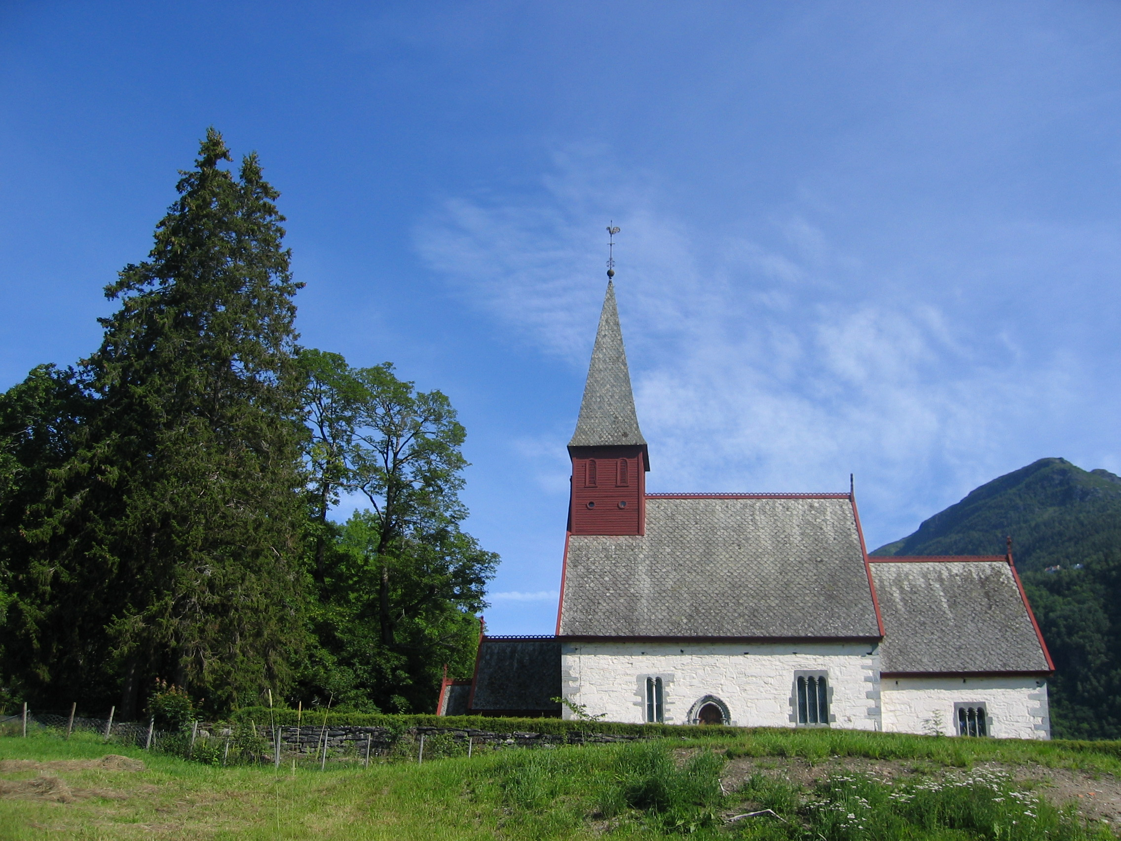 Dale kyrkje i Luster